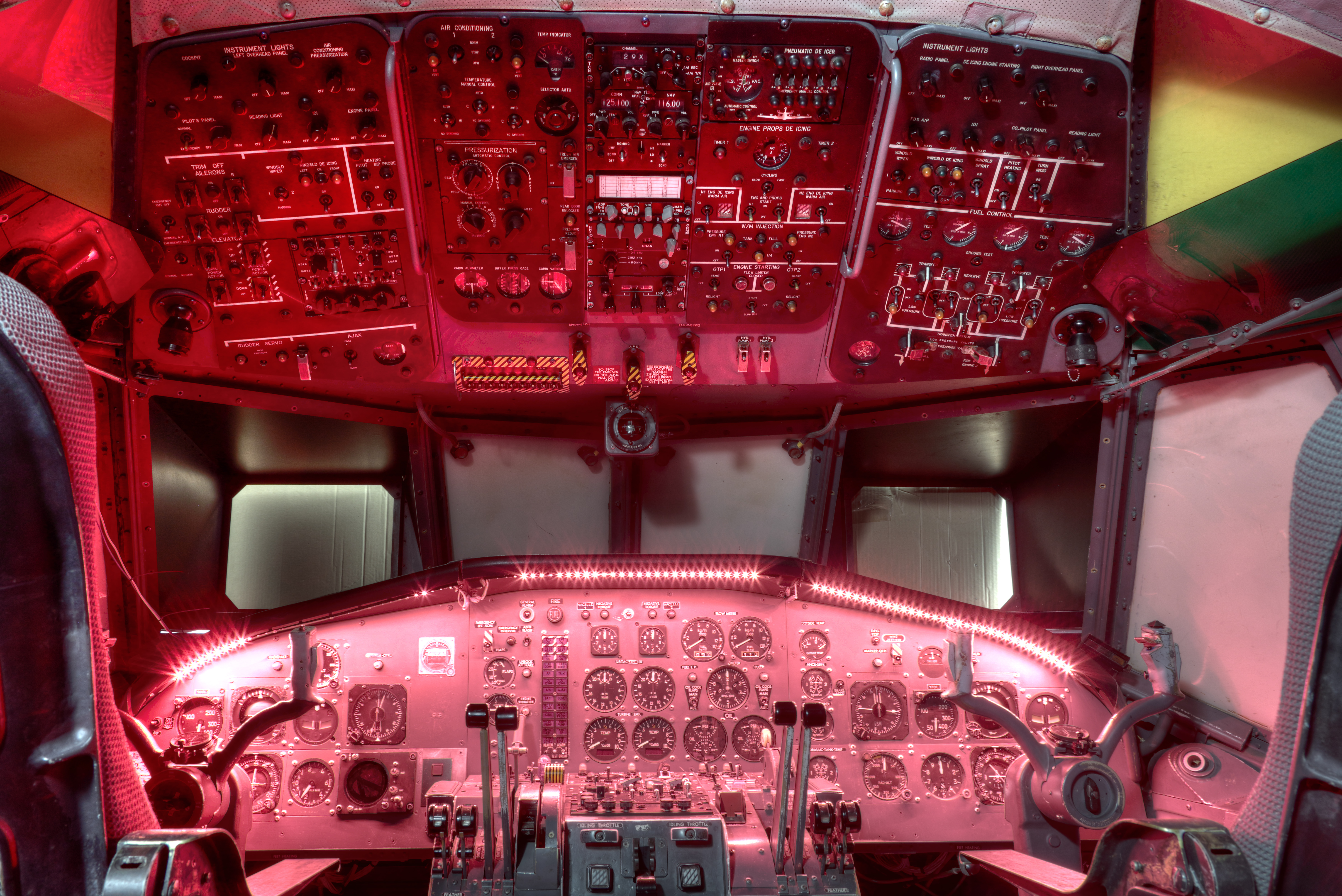 Cockpitbeleuchtung Im Simulator Breguet Atlantic im Museum Aeronautikum Nordholz